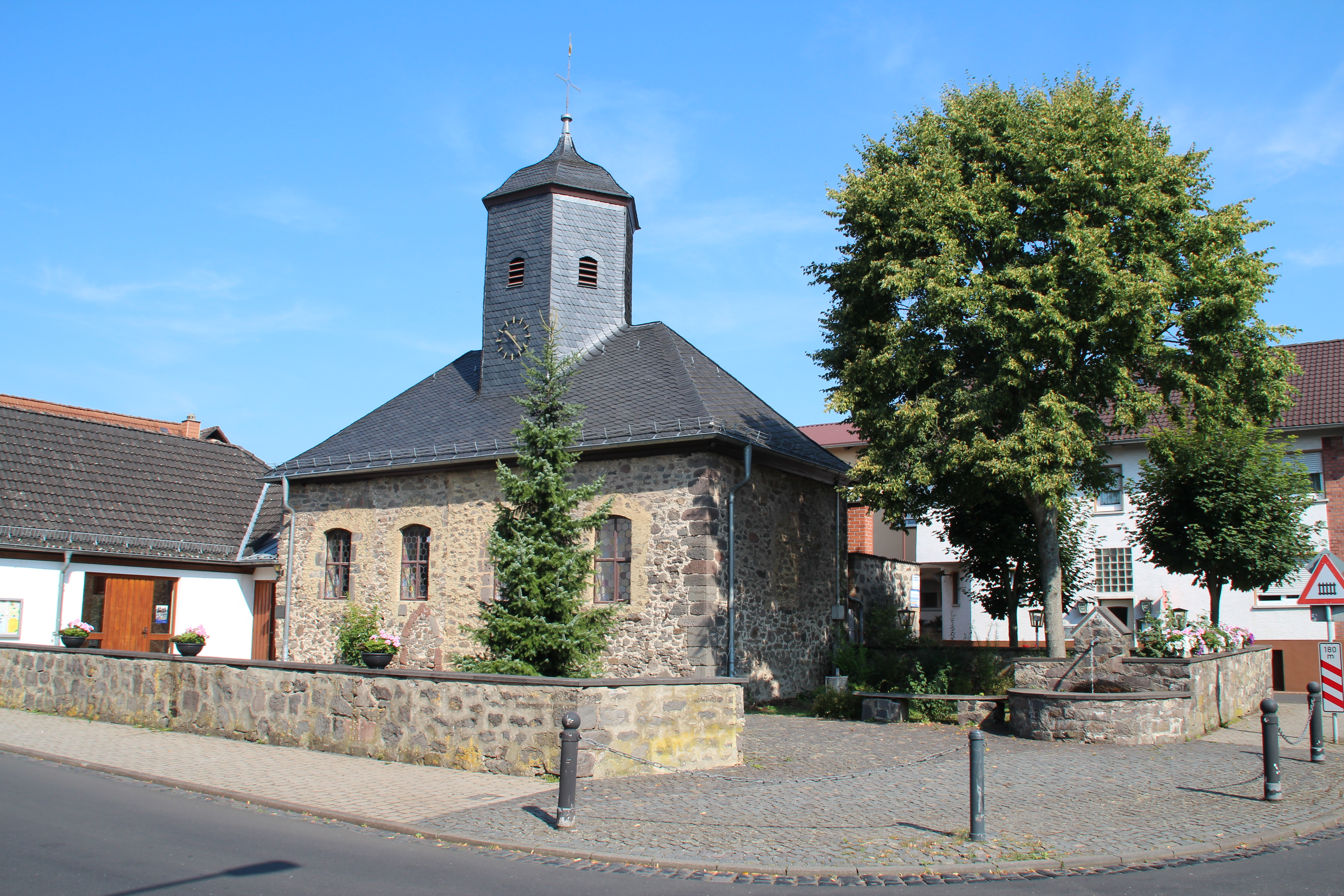 Südseite der Evangelischen Kirche Lindenstruth, Gemeinde Reiskirchen, Landkreis Gießen, Hessen, Deutschland